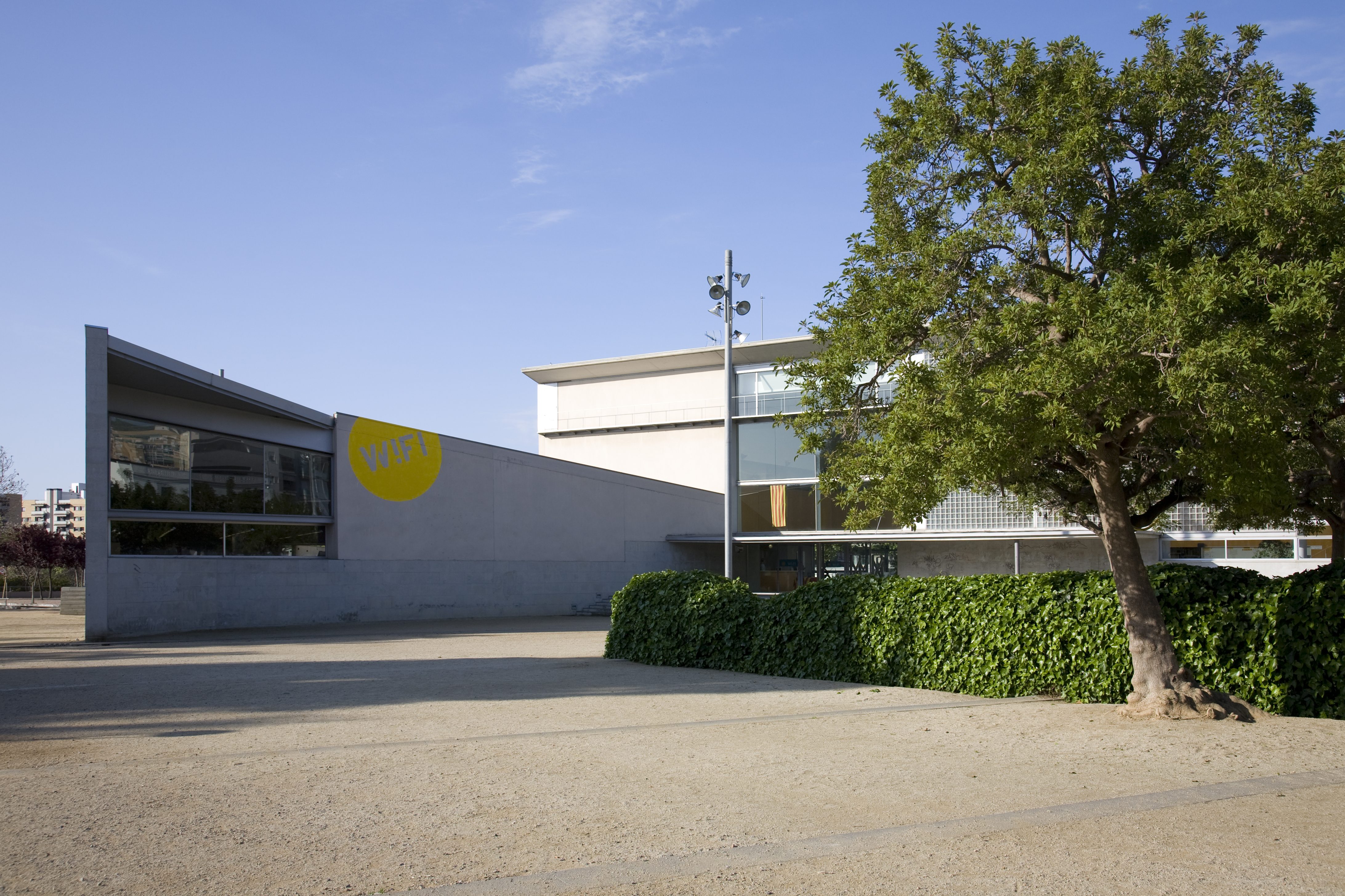 Parc del darrera de la Biblioteca de Viladecans